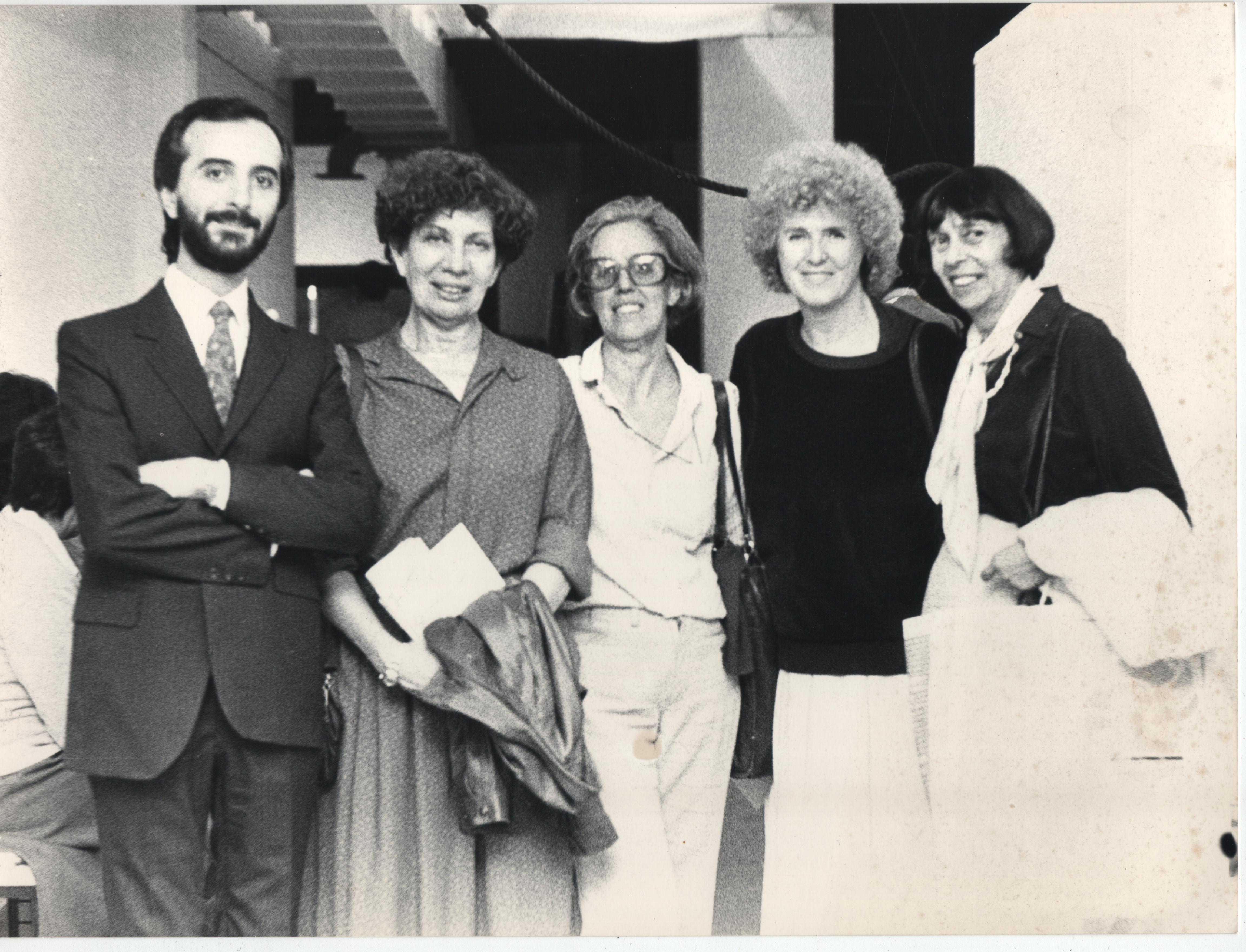 Galería Cinemateca (1993), de izquierda a derecha: Ricardo Casas con las pintoras uruguayas Katusha Sánchez, Hilda López, Linda Cohen, Eva Olivetti